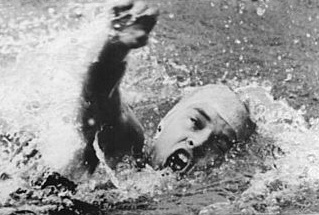 Sabine Steinbach, Sabine Rantzsch, Doris Kohardt Zentralbild Kluge (2)-Ksch 5.9.1968 Berlin: DDR-Teilnehmer der XIX. Olympischen Sommerspiele vom 12.-27.10.1968 in Mexiko-Stadt Schwimmen-Frauen: Oben: Sabine Steinbach (SC Karl-Marx-Stadt), Mitte: Sabina Rantzsch (SC DHfK Leipzig), unten: Doris Kohardt (Empor Rostock). Information added by Wikimedia users. Sabine Rantzsch